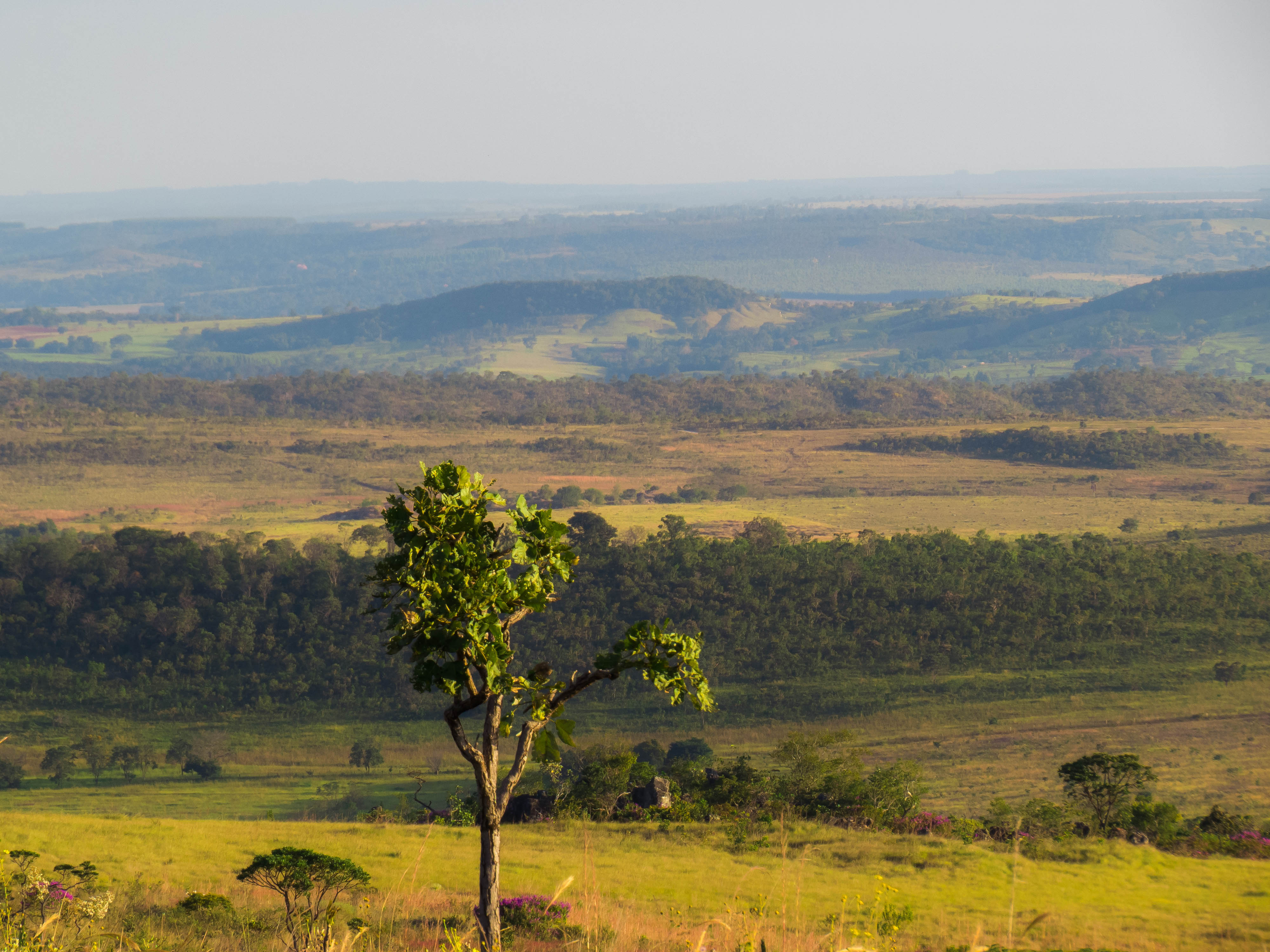 Parque Estadual dos Pireneus - Morro Cabeludo - Goiás - Brasil